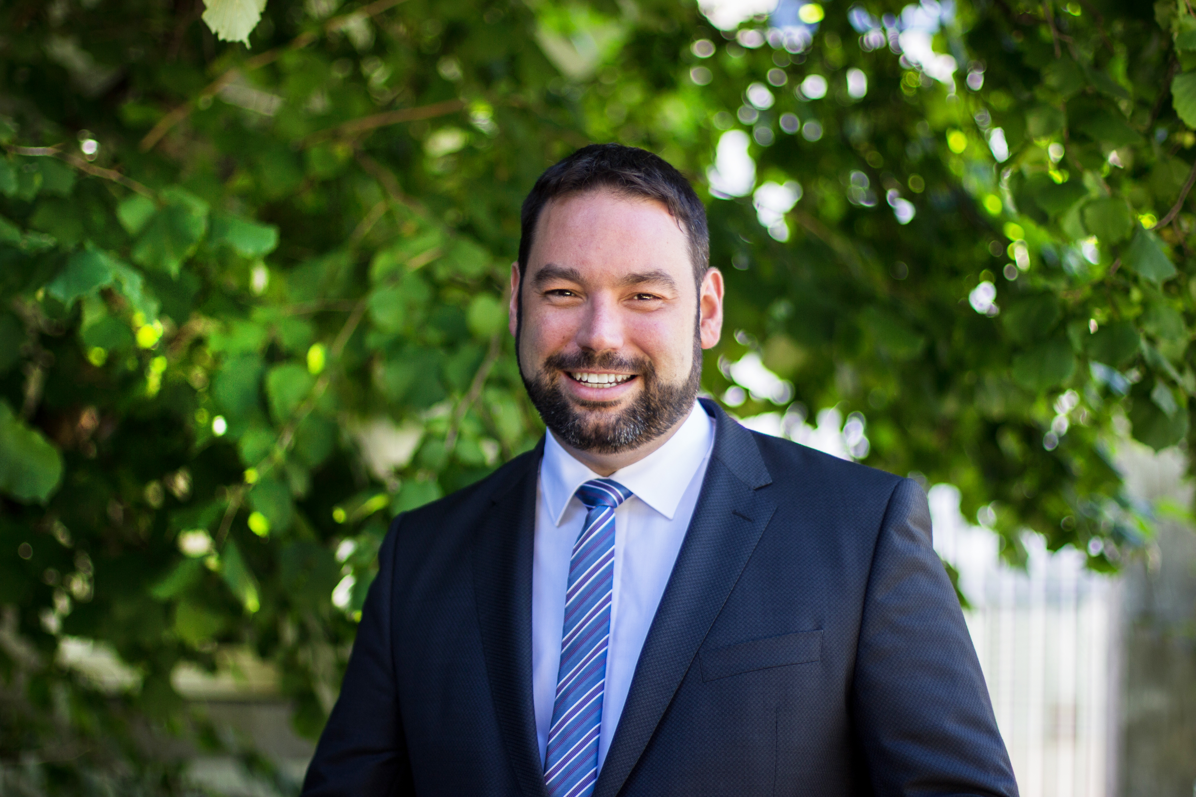 Harald Mollers, Minister für Bildung, Forschung und Erziehung in der Deutschsprachigen Gemeinschaft Belgiens